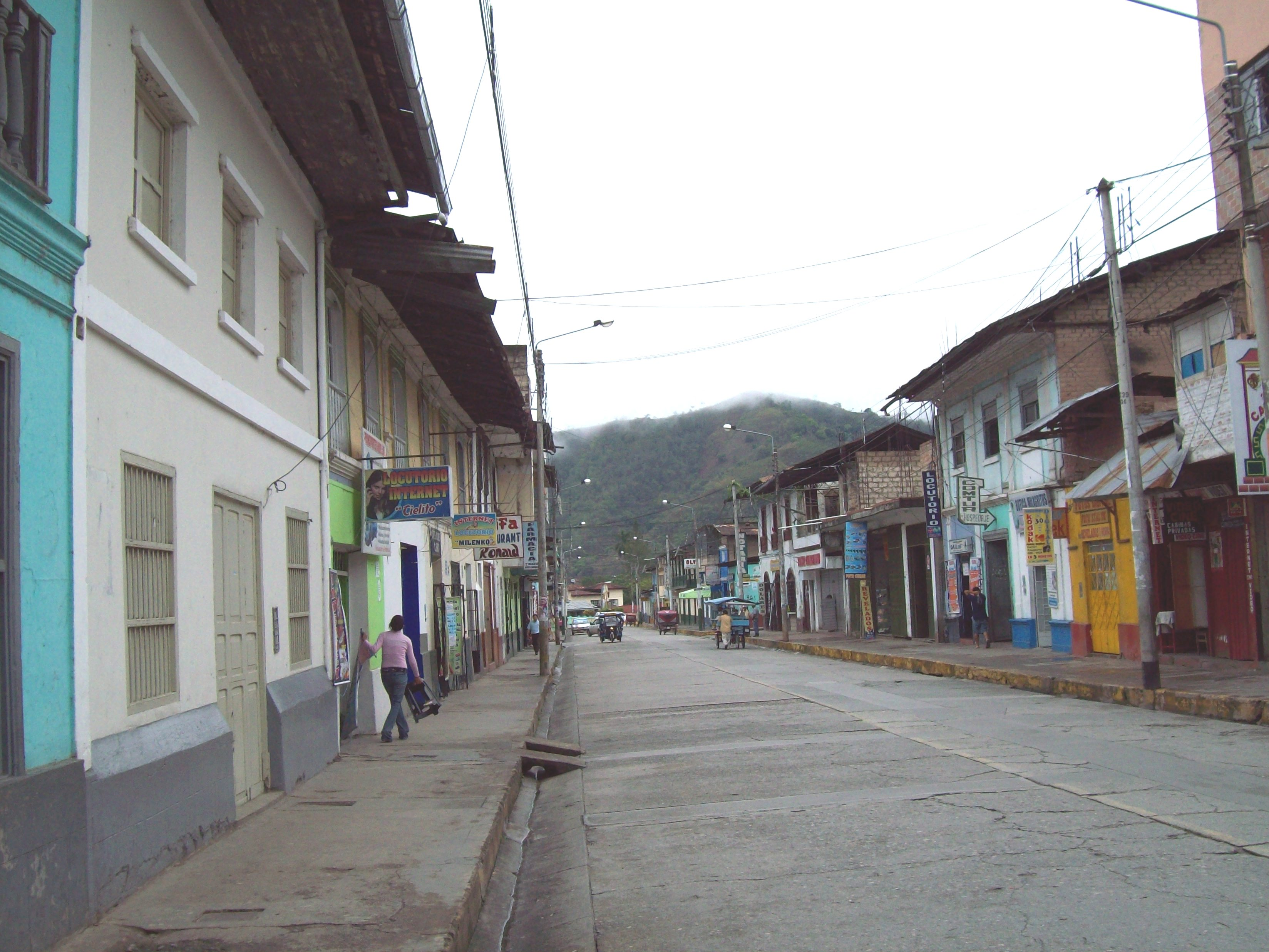 Cuadra 3 jiron progreso de san ramon